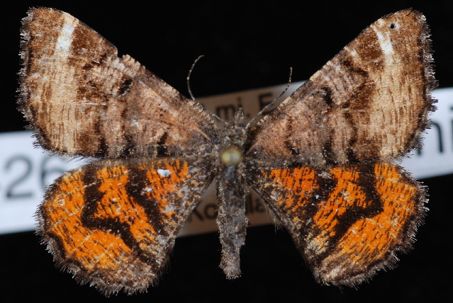 Dasyfidonia avuncularia